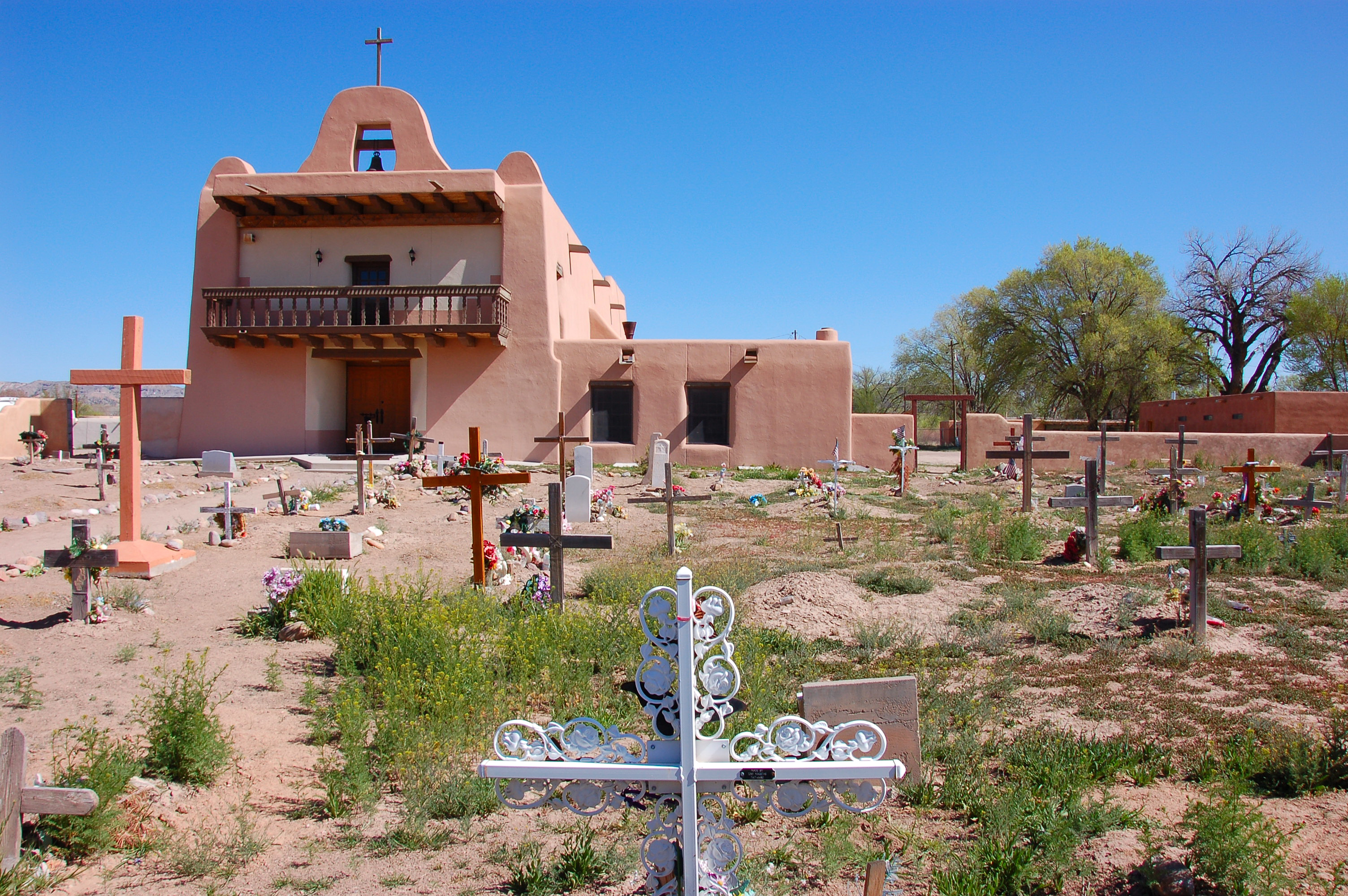 San Ildefonso Pueblo